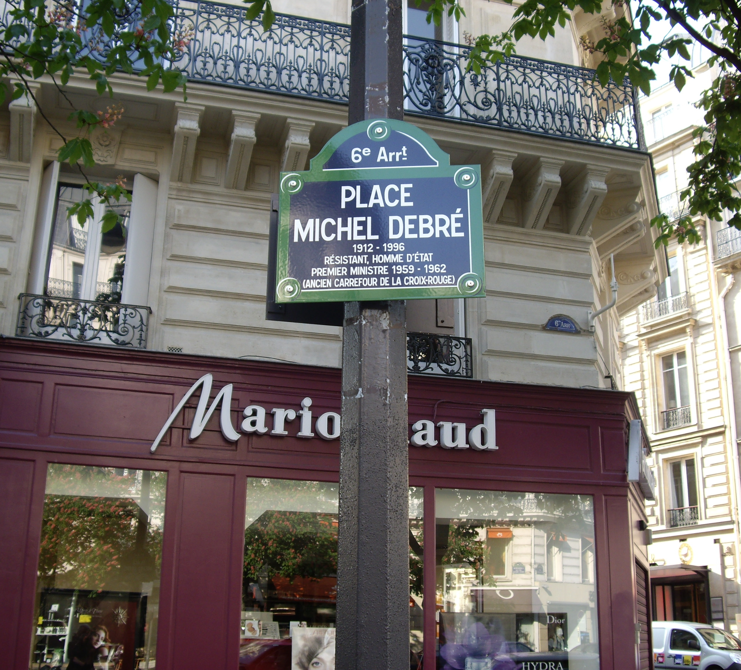 Place Michel-Debré, Paris 6e.